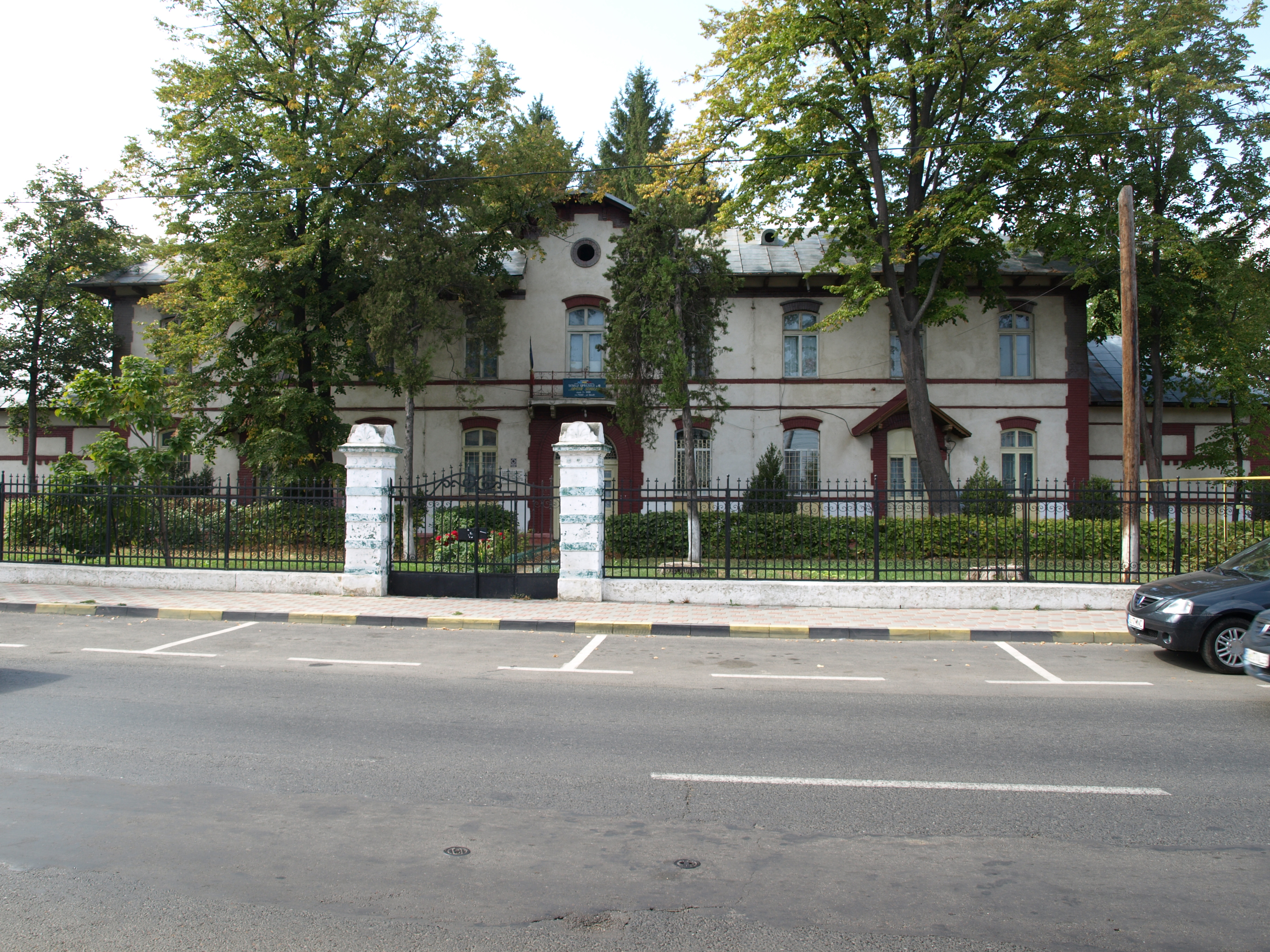 Școala tip "Spiru Haret"